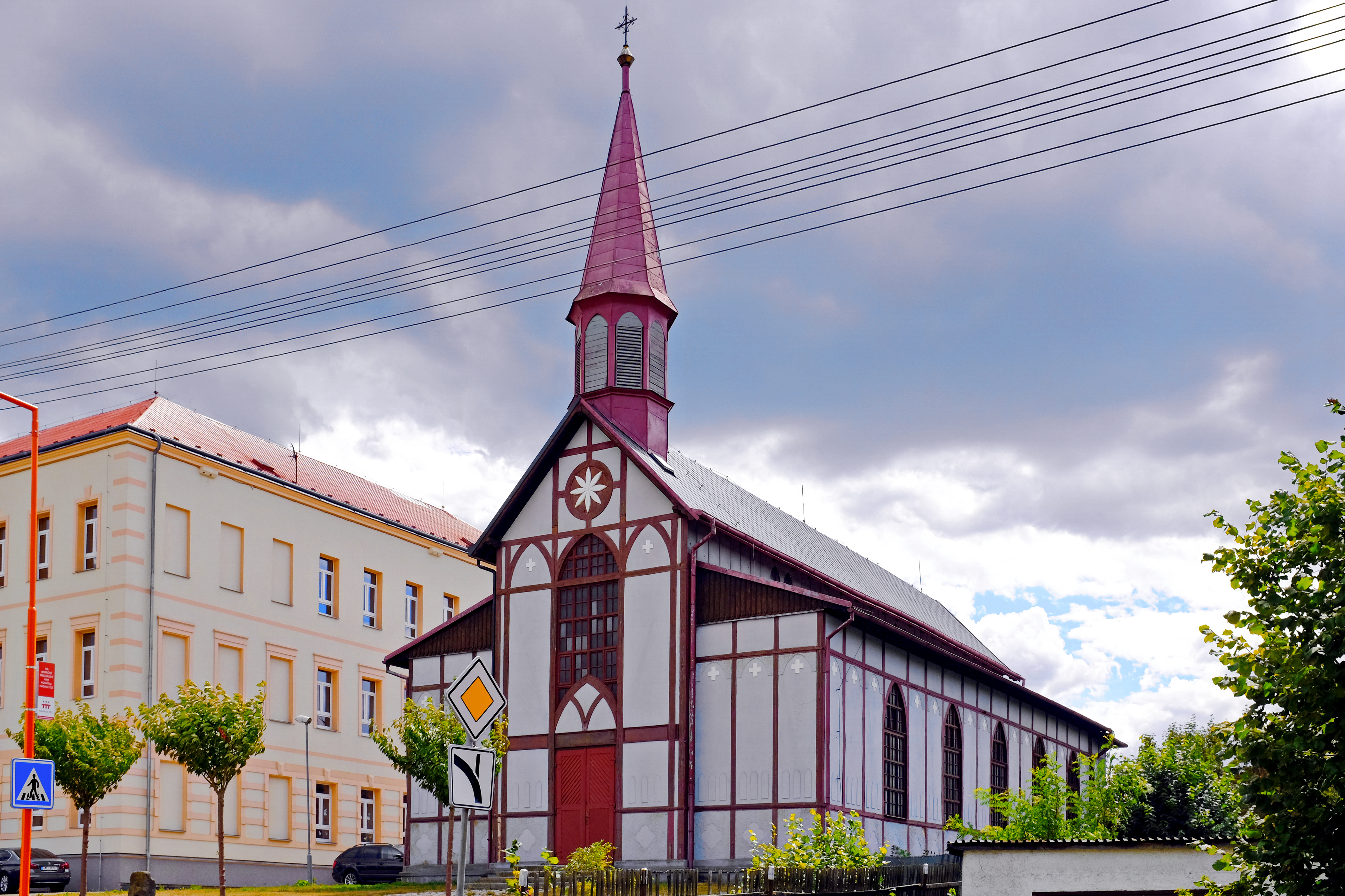 Nové Sedlo, kostel Nanebevstoupení Páně, okres Sokolov